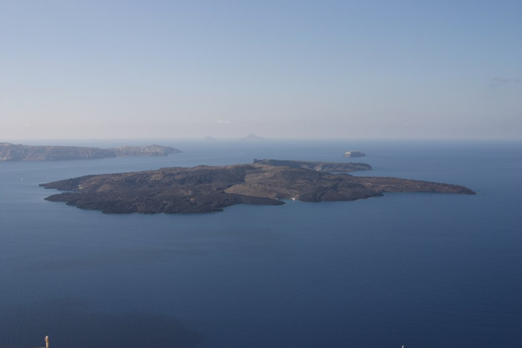 Santorini, Nea Kameni